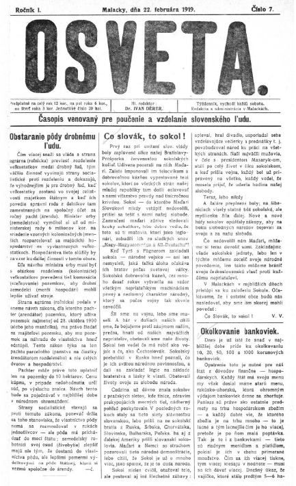 Titulný list periodika Osveta z r. 1919, ktoré vychádzalo v Malackách po prvej svetovej vojne.